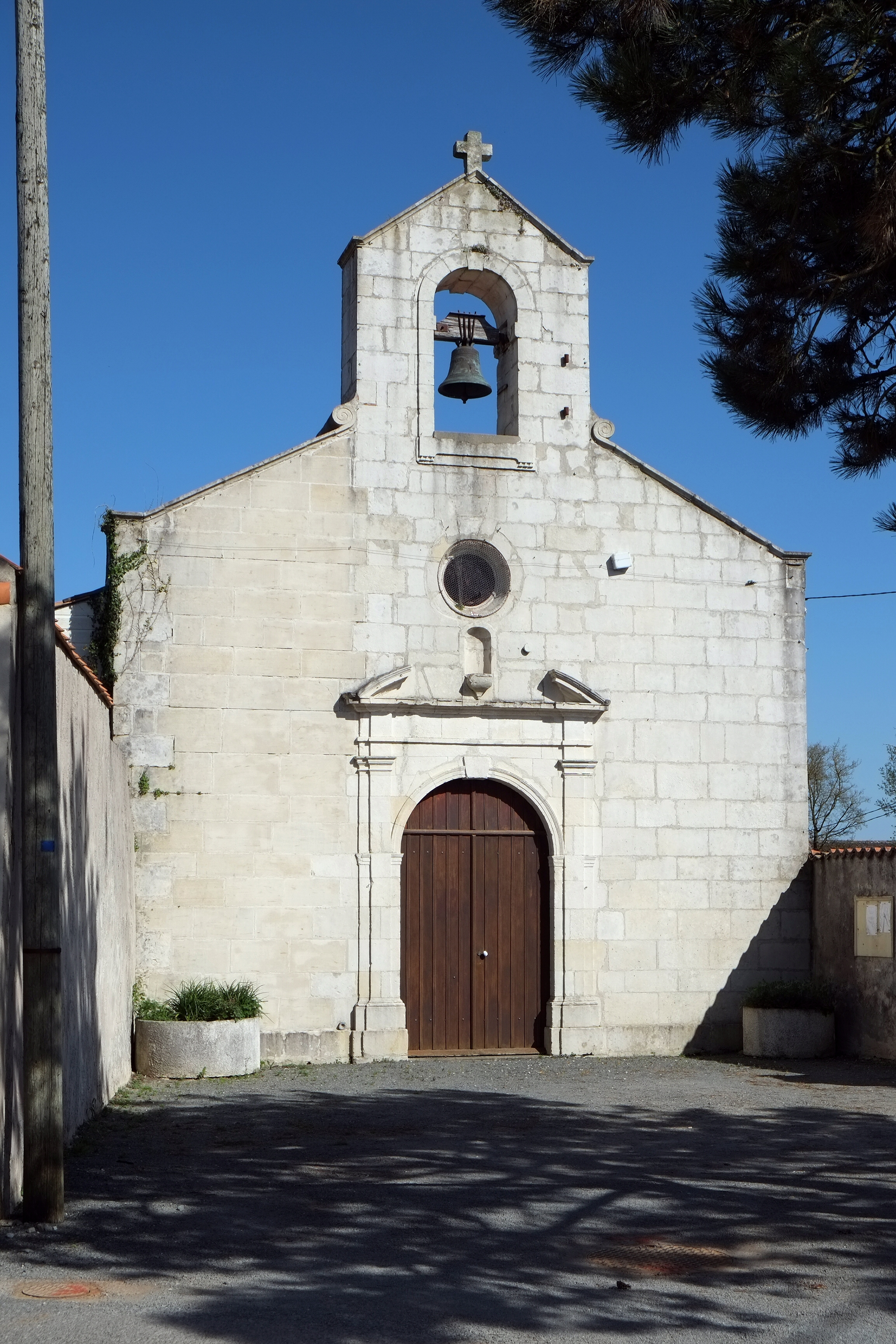 Église Sainte-Anne Montroy Charente-Maritime France